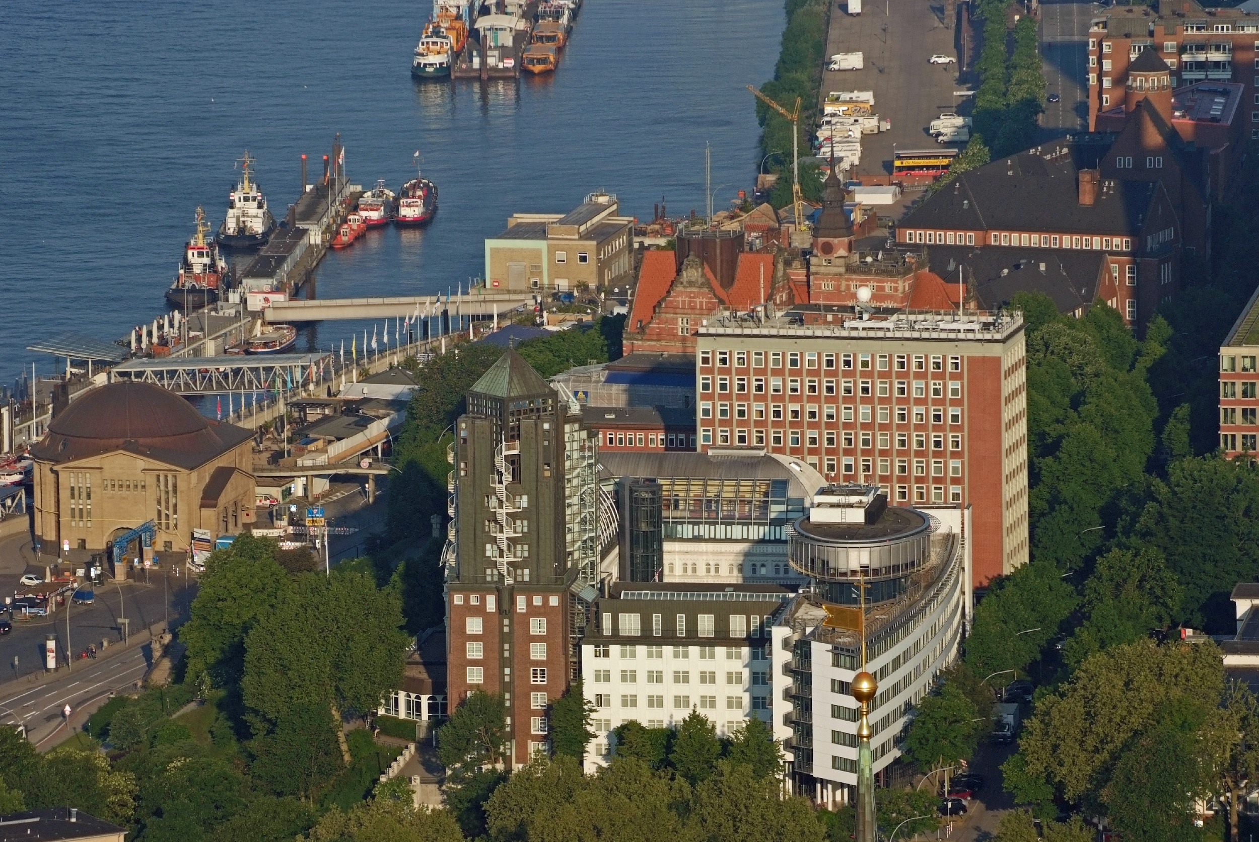 Projekt Heißluftballon Hotel Hafen Hamburg und Bernhard-Nocht-Institut für Tropenmedizin